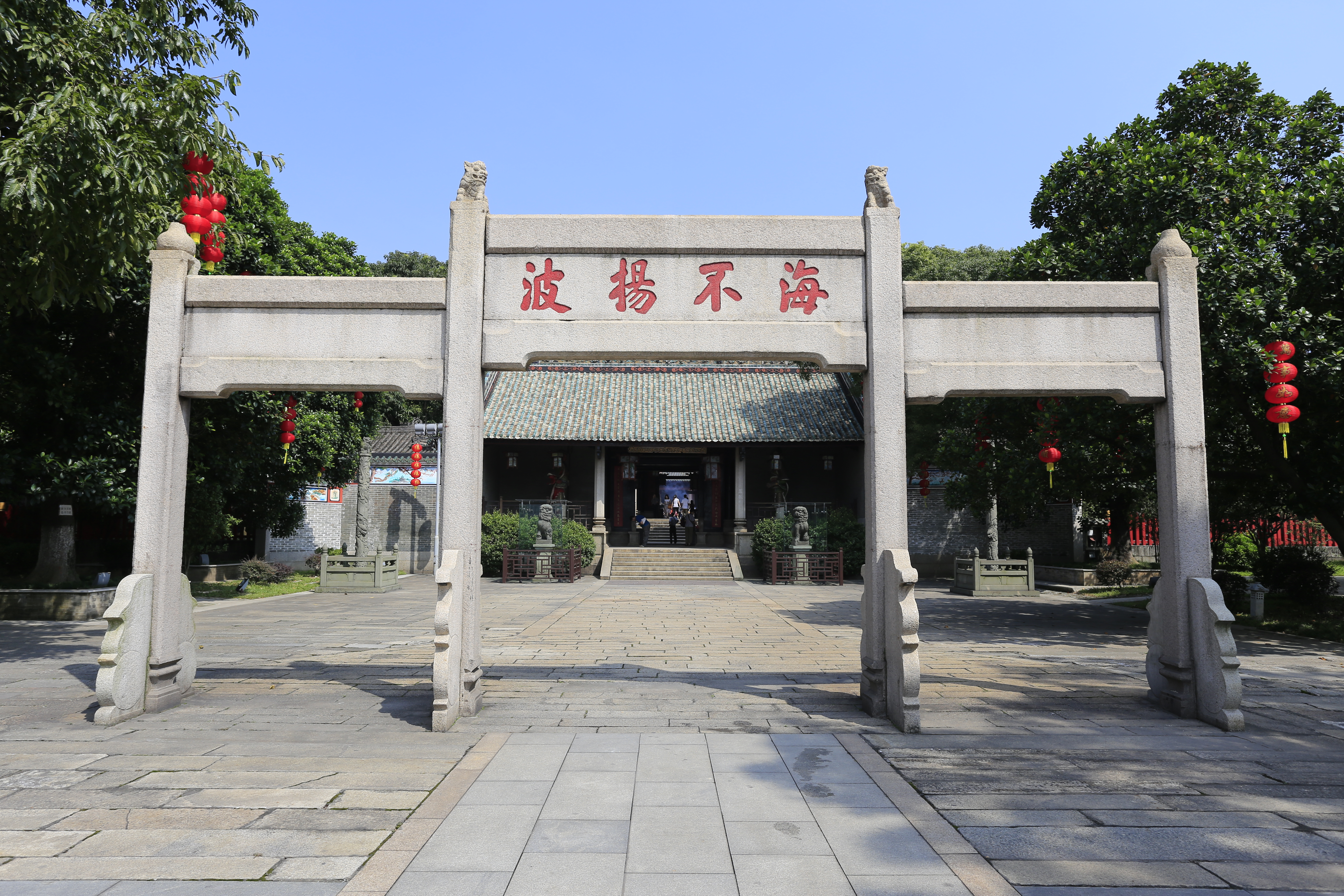 广州南海神庙 “海不扬波”石牌坊